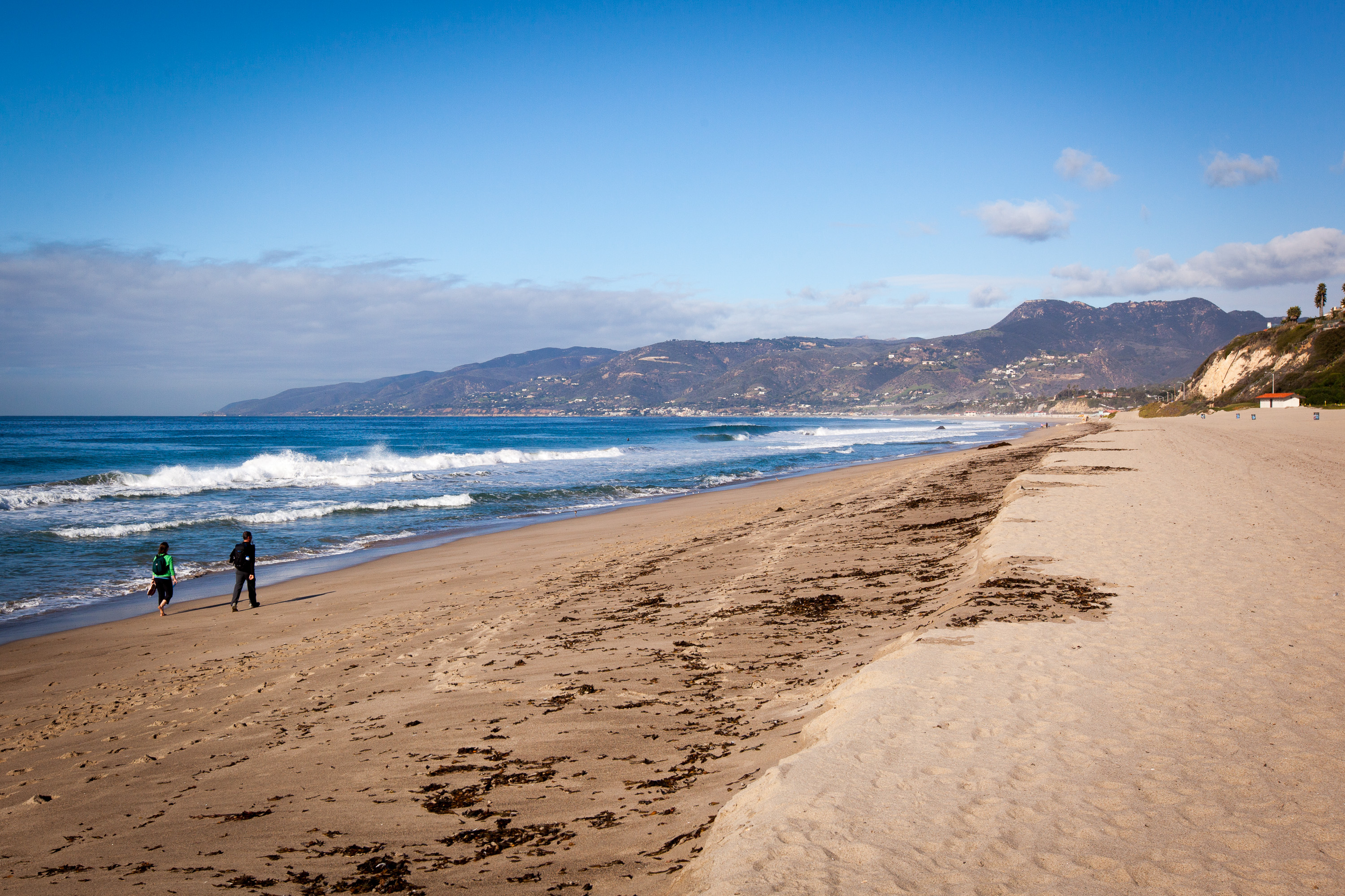 Point Dume, CA, USA